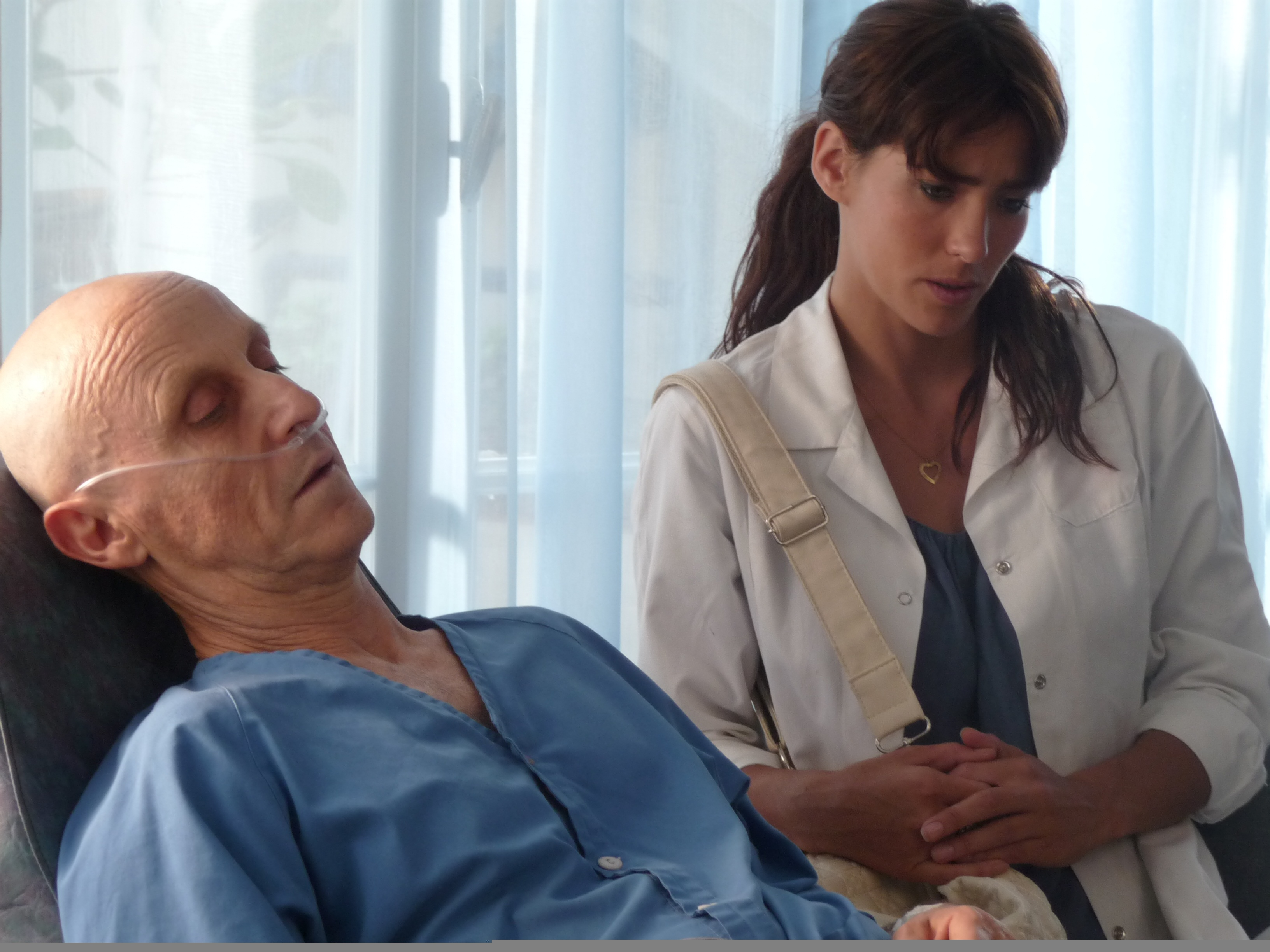 חן יאני ועמי ויינברג מתוך סרטו של דורון ערן נמס בגשם